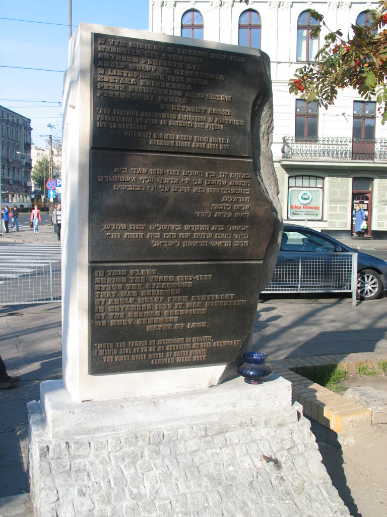 Pomnik w miejscu Wielkiej Synagogi w Łodzi